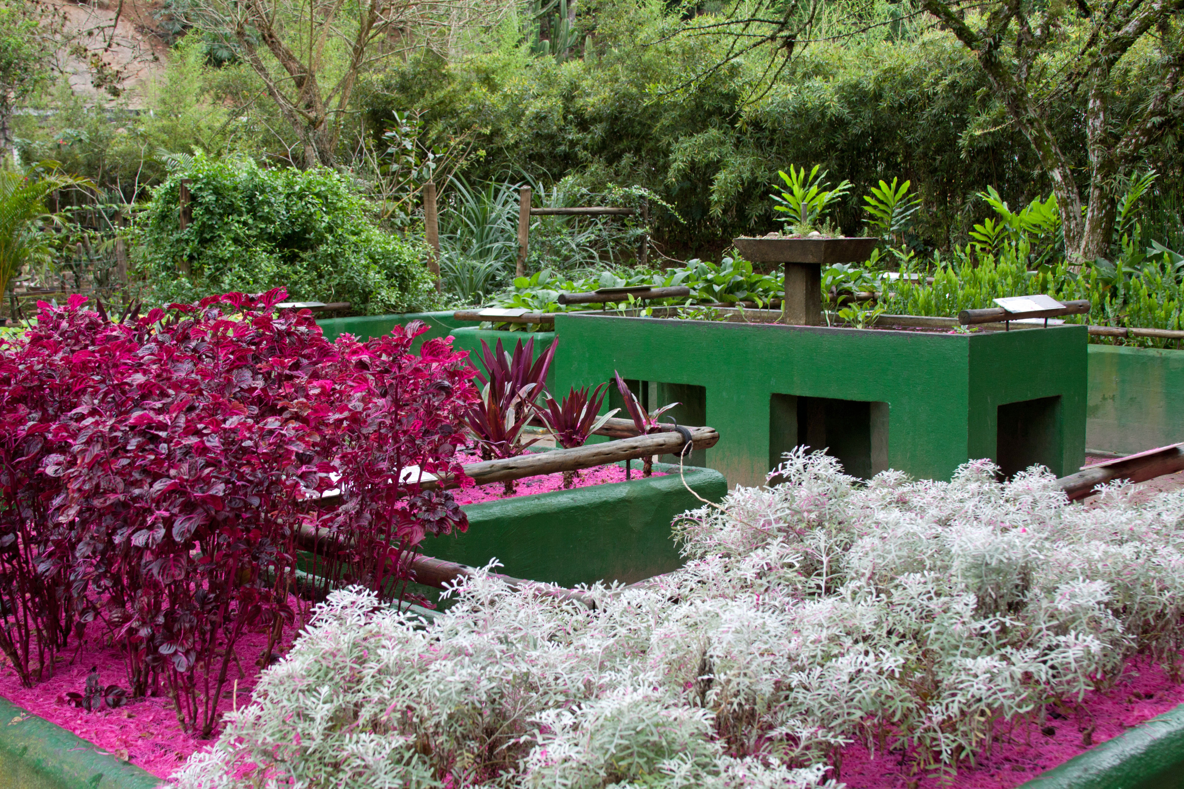 Jardim Sensorial no Jardim Botânico do Rio de Janeiro.